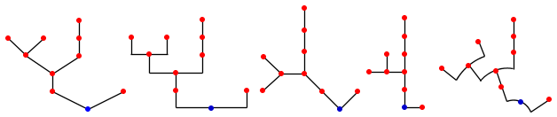 Quatre representations d'un arbre de Galton-Watson engendré par la suite : (2,1,2,2,0,0,1,1,0,0,2,...)